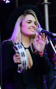 Germán Tripel y Florencia Otero en la segunda edición del evento musical “Estrellas en Calle Corrientes” en 2017.